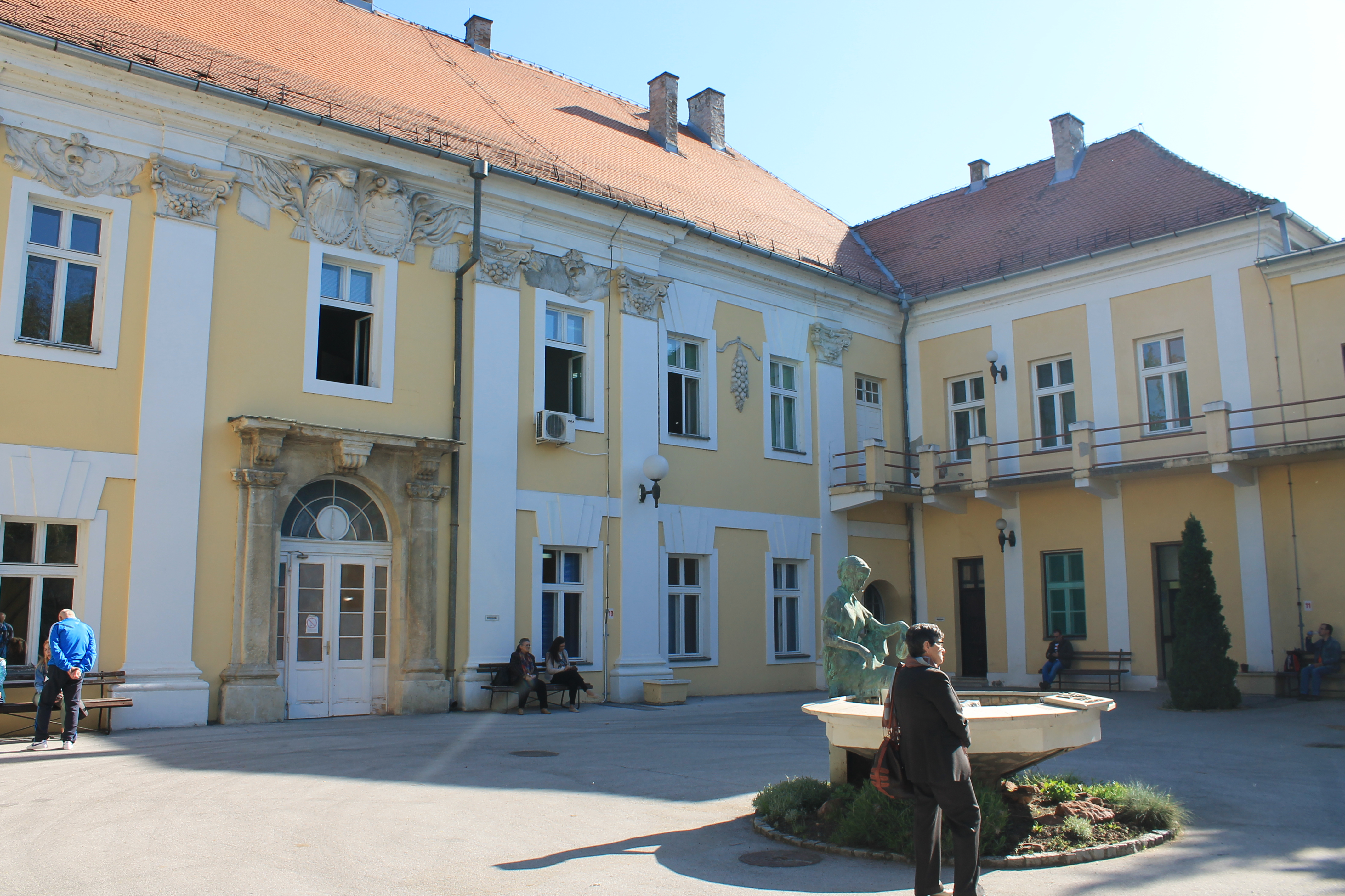 Vojna bolnica Petrovaradin